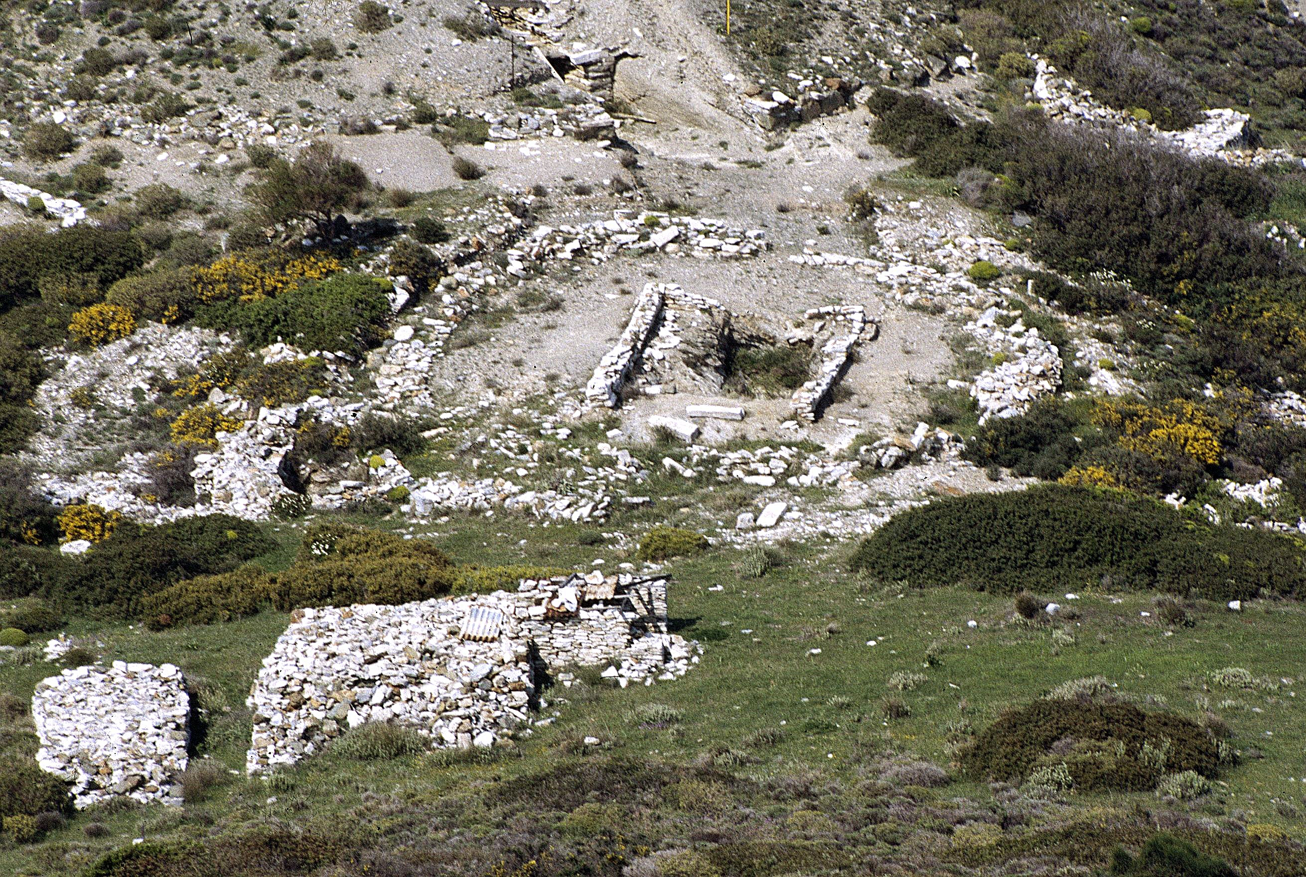 Thorikos